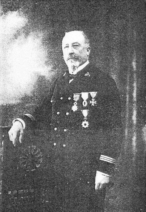 フランス人招聘軍楽教官シャルル・ルルー肖像